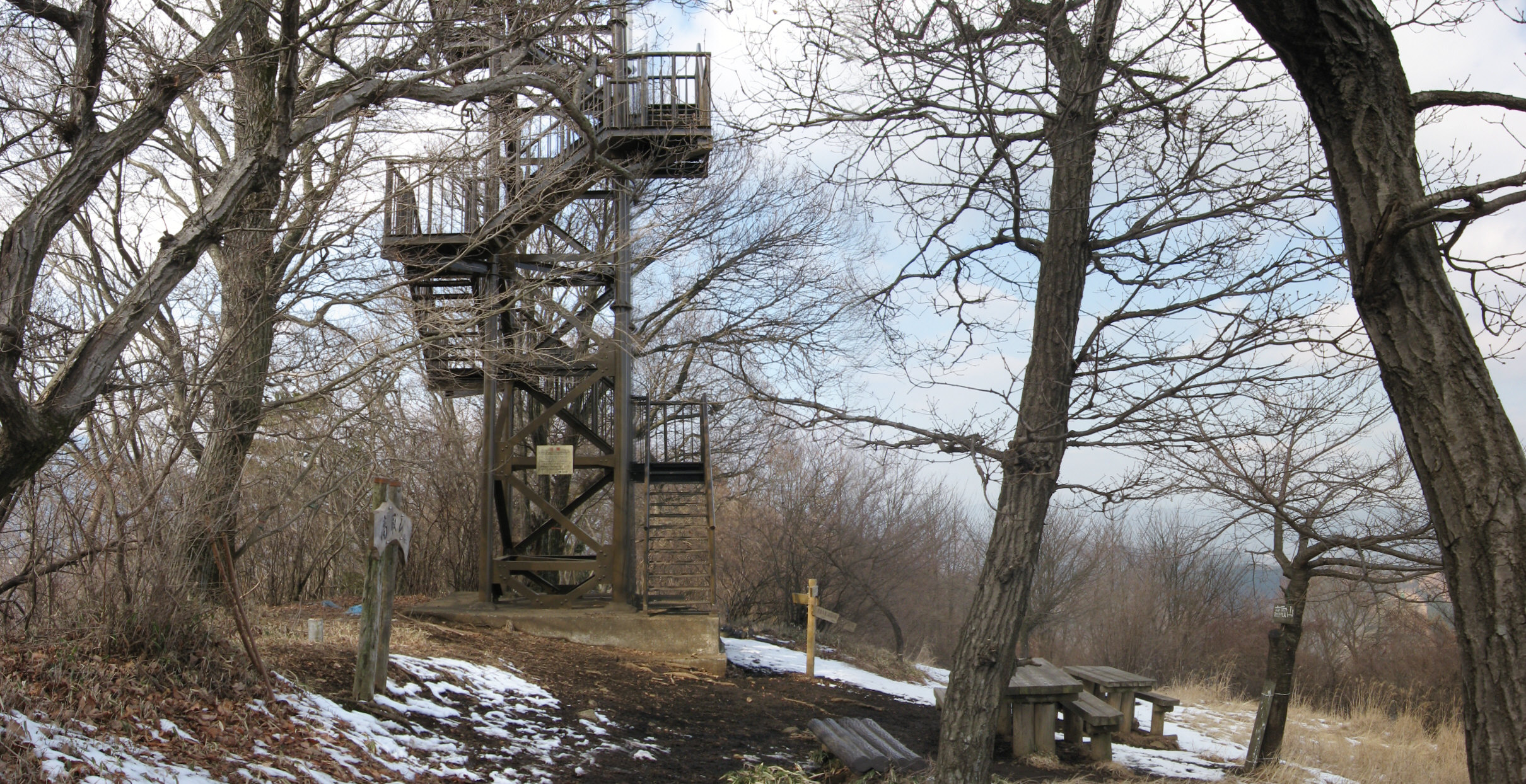 高取山山頂